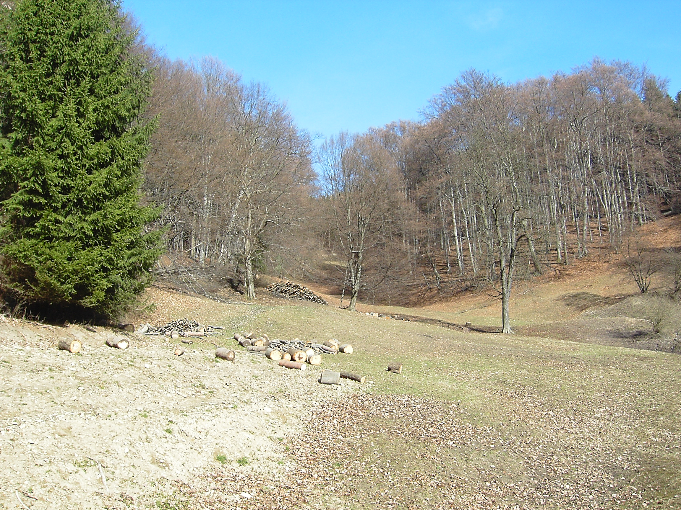 PR Bílé potoky. Fotografie z velikonoční brigády 2006 - odstraňování polomů z louky.